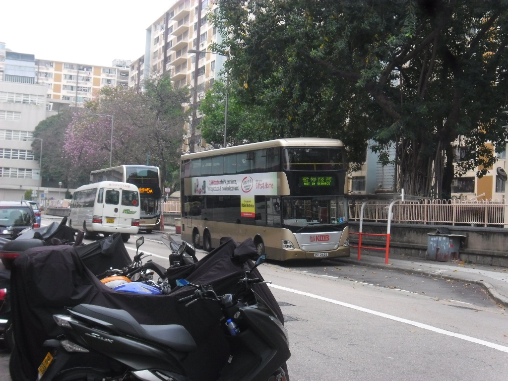 中文（香港）: 九龍城盛德街巴士總站(2016年)